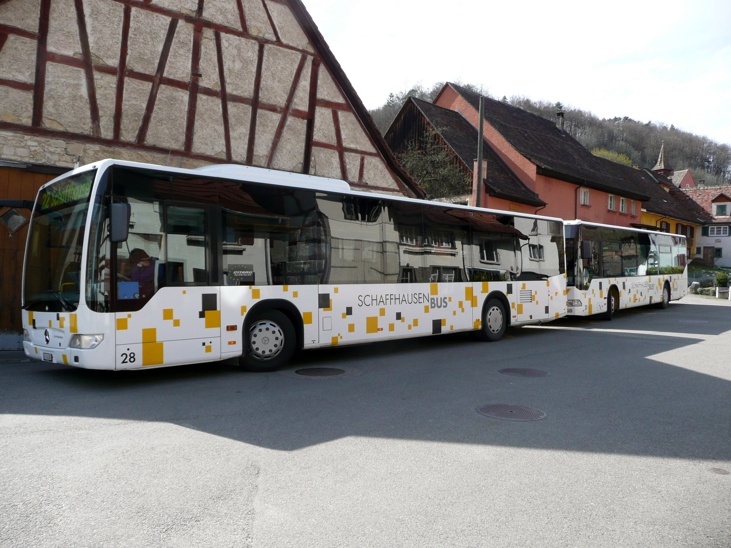 Busse (Mercedes-Benz Citaro) von SchaffhausenBus in Hemmental, Kanton Schaffhausen/Schweiz